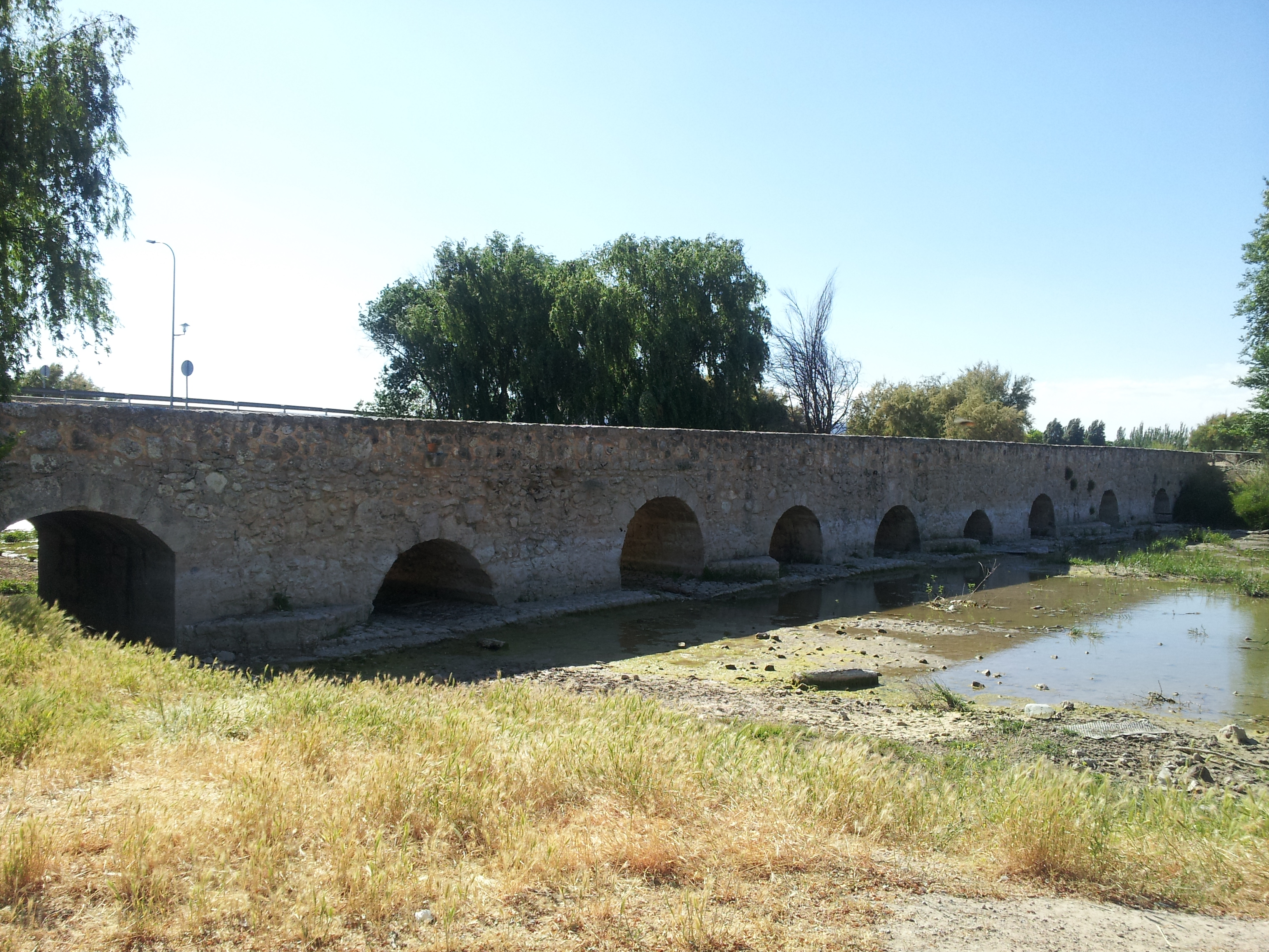 Puente romano de Villarta de San Juan sobre el río Cigüela